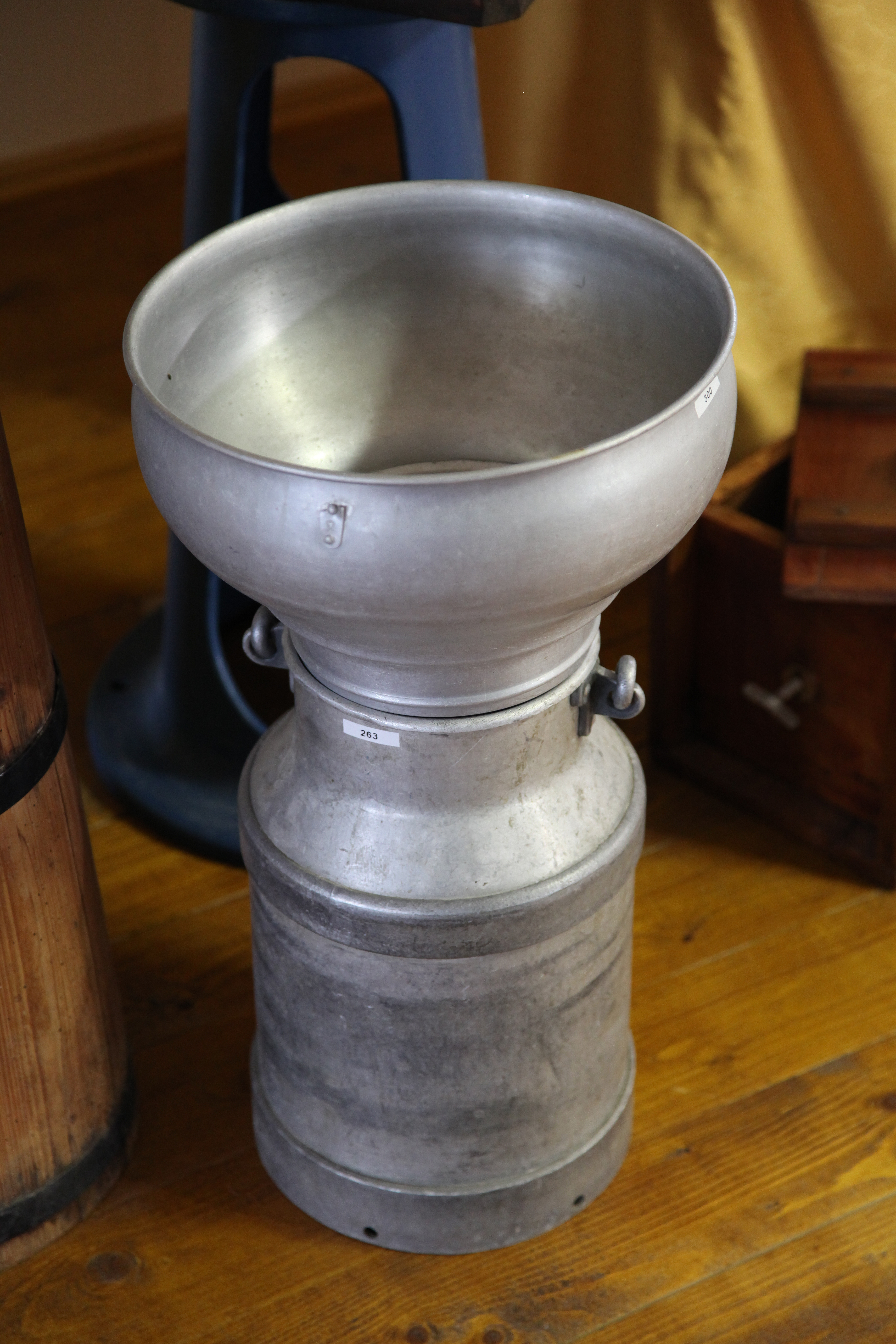 Heimatstube im Dorfgemeinschaftshaus im restaurierten Nebengebäude von Schloss Gebelzig, Gebelzig, Hohendubrau